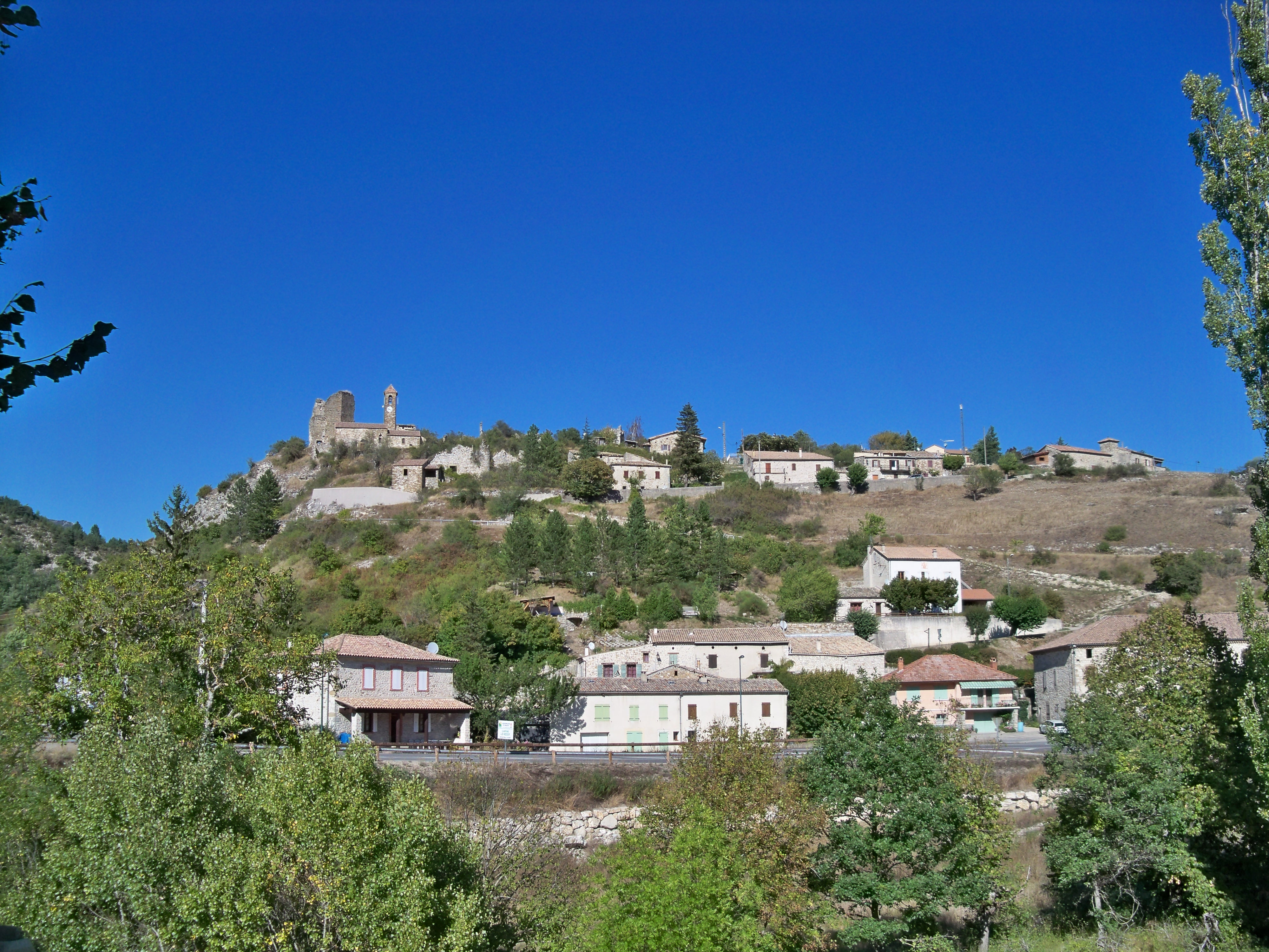 vue sur le village de Verclause (26)